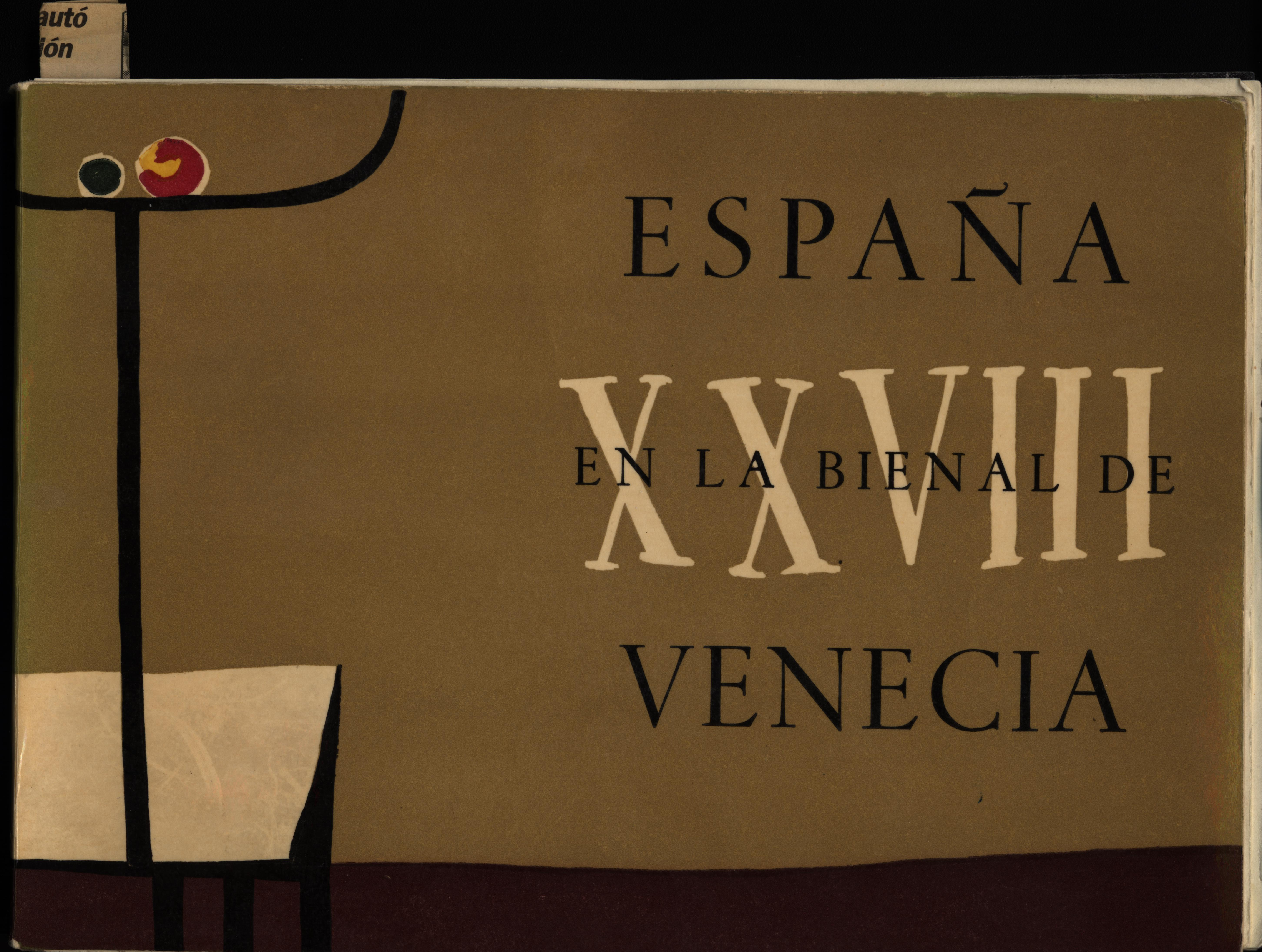 Modesto Ciruelos. XXVIII Bienal de Venecia. Catálogo. Modesto Ciruelos, Manuel Millares, Rafael Canogar, Antonio Saura, Pablo Gargallo, Rafael Zabaleta, Díez Caneja, Menchu Gal, Angel Manrique, Manuel Mampaso.